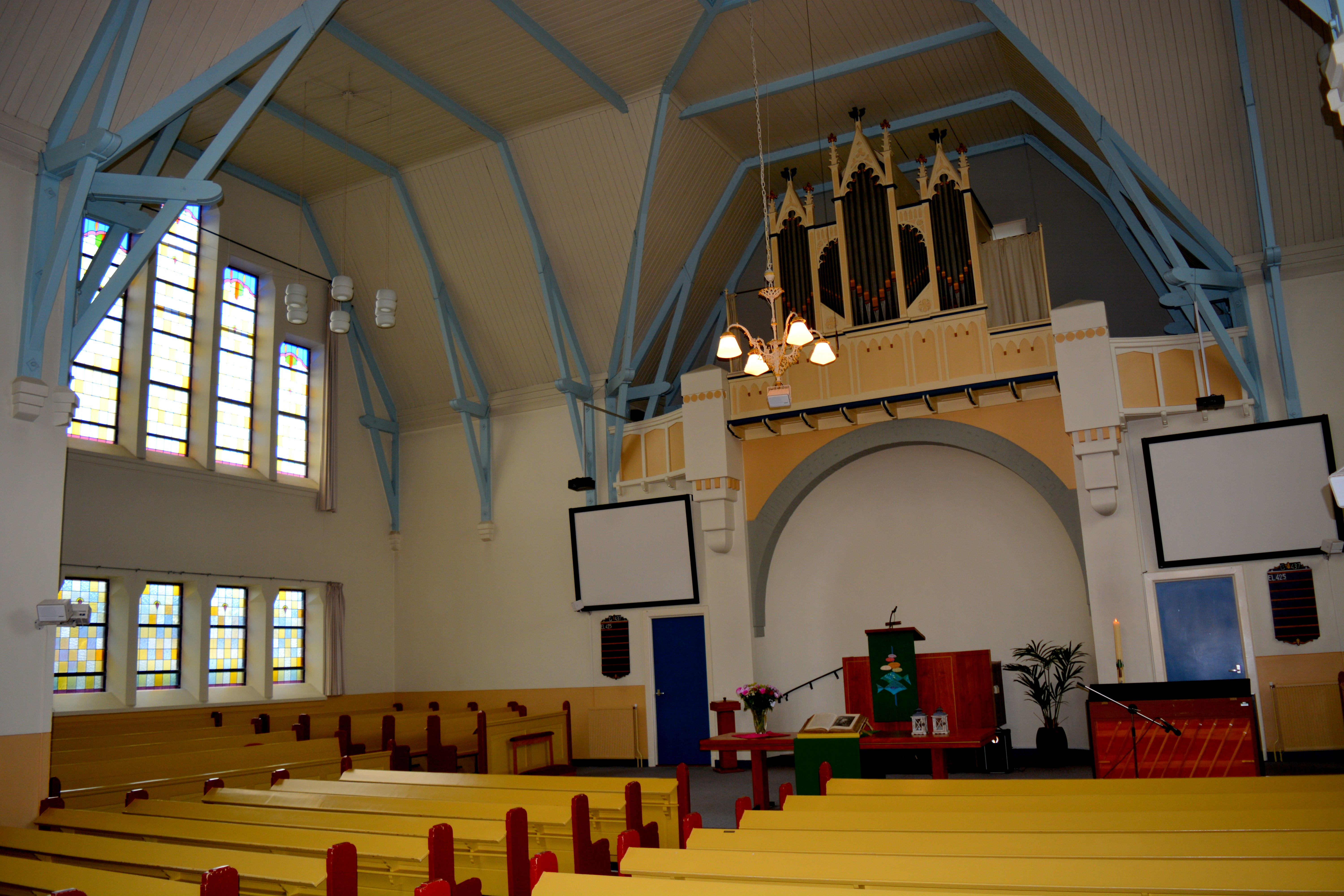 Wouterswoude, geref. kerk, interieur